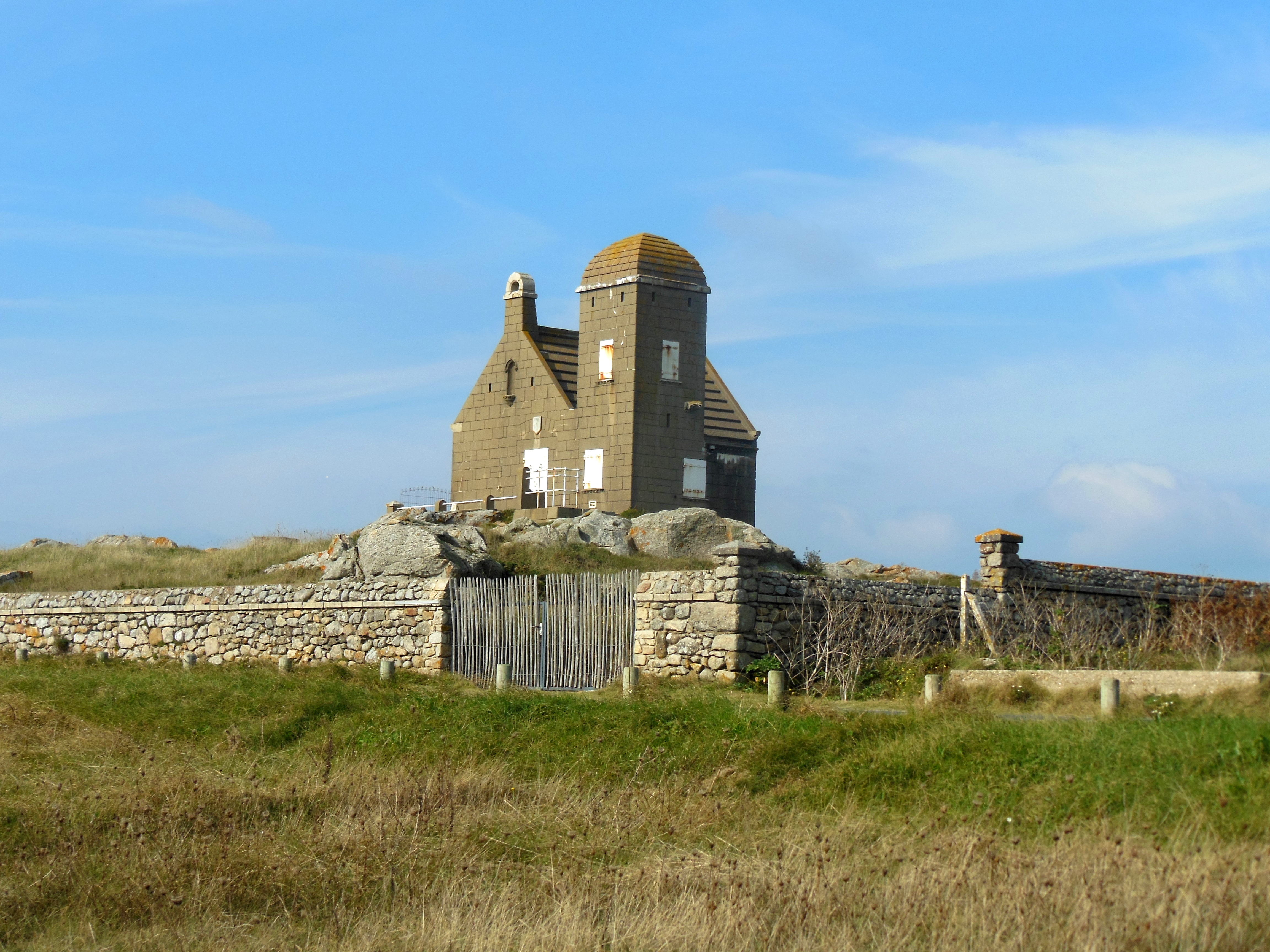 La Vigie La Romaine, commune du Croisic (Loire-Atlantique, France)